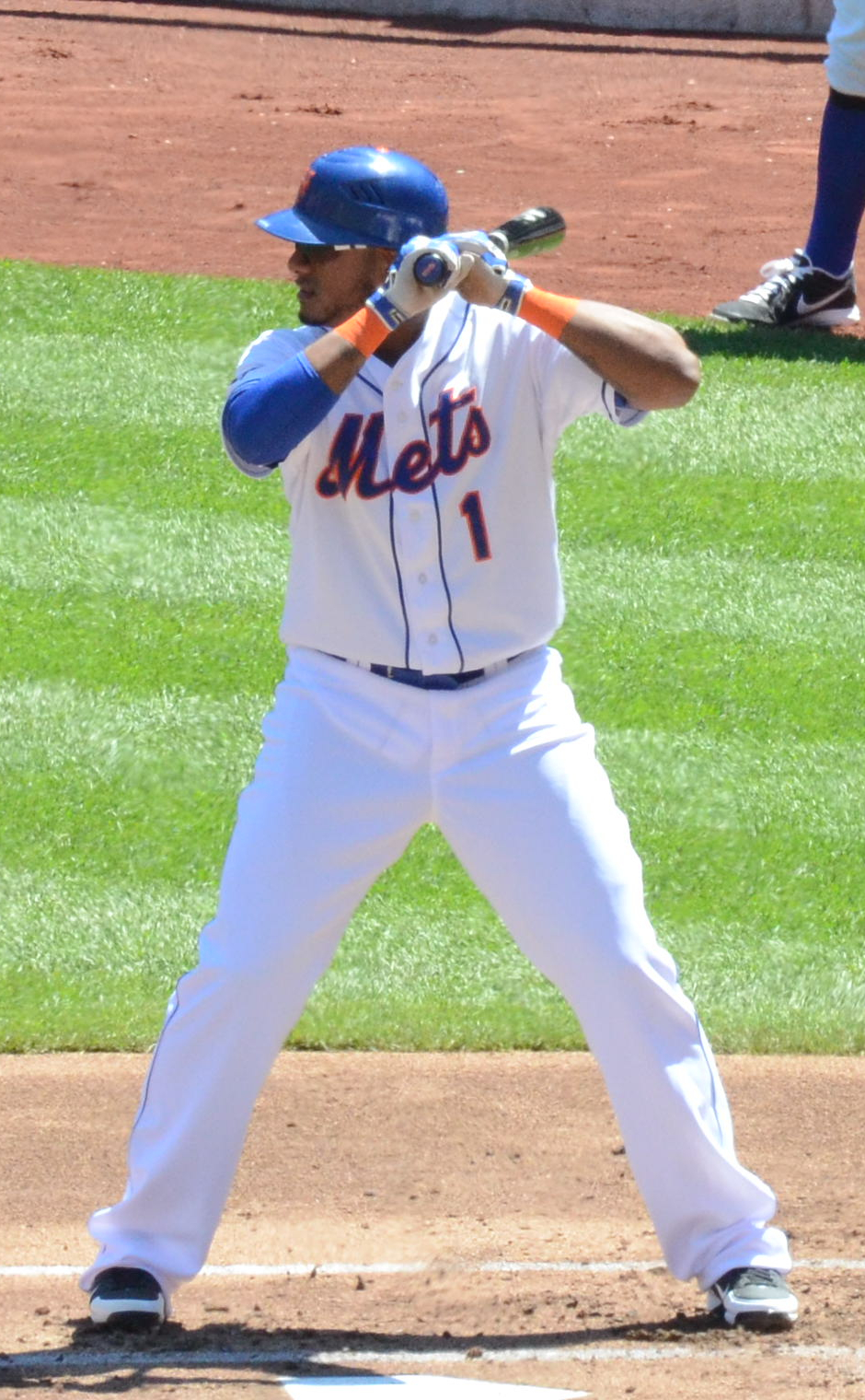 Jordany Valdespin